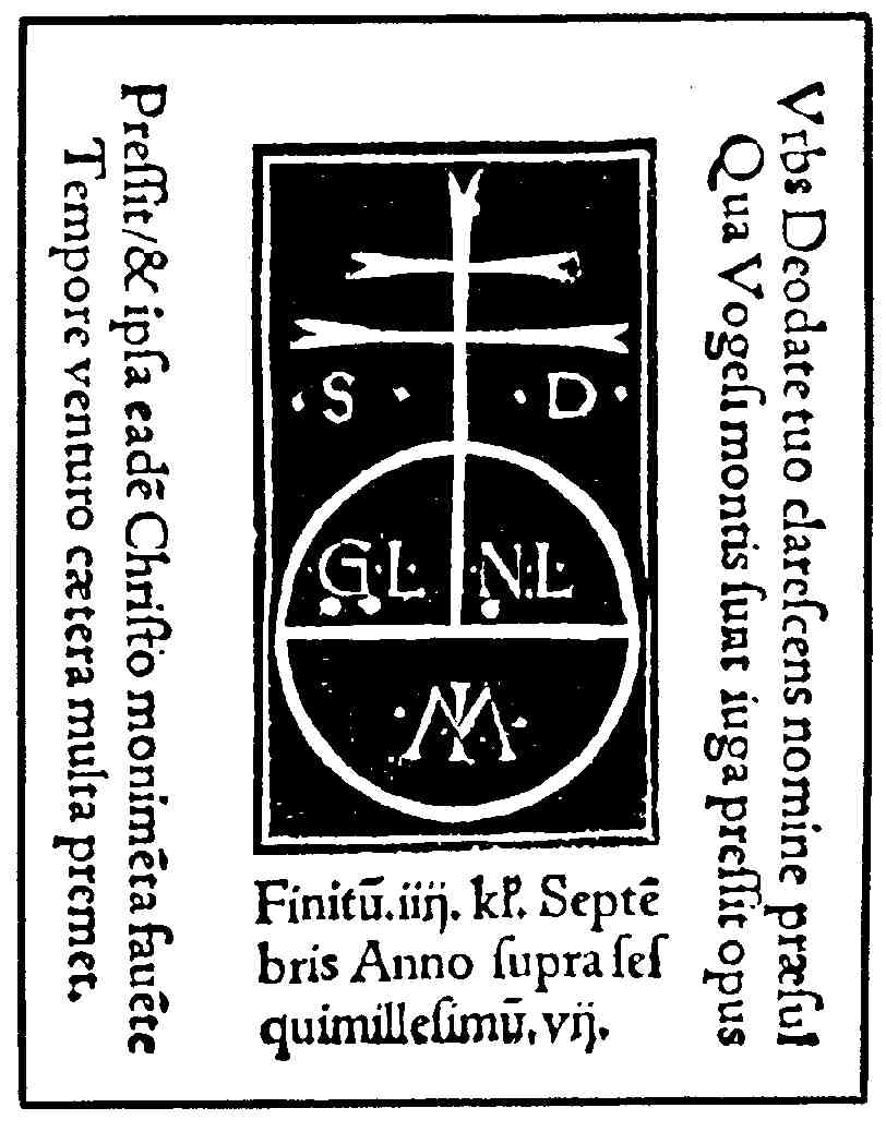 Cosmographiae Introductio (1507, Martin Waldseemüller: marque de l'imprimerie de Saint-Dié-des-Vosges